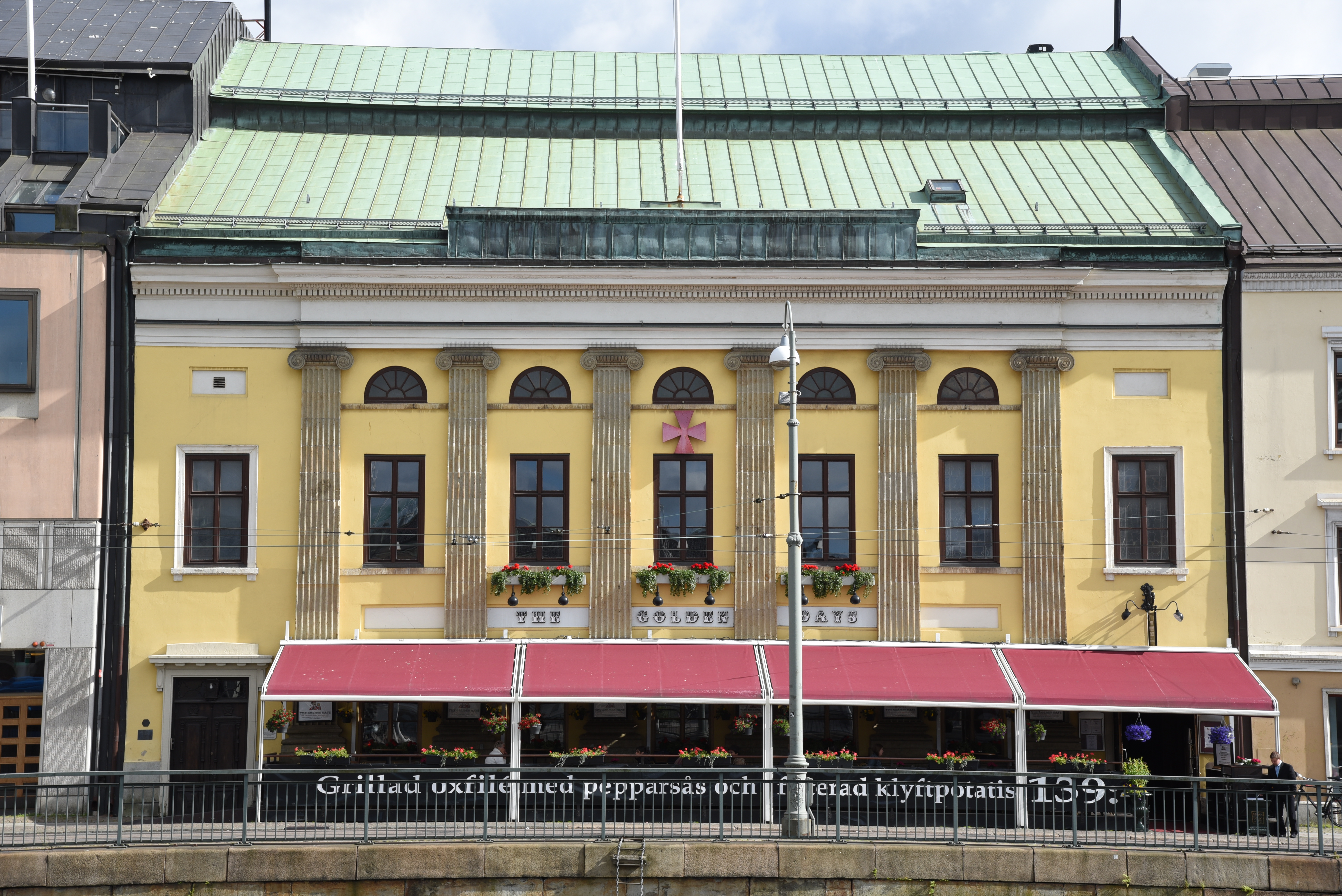 Frimurarlogen i 15 kvarteret Frimuraren på Södra Hamngatan 31 i stadsdelen Inom Vallgraven i Göteborg.